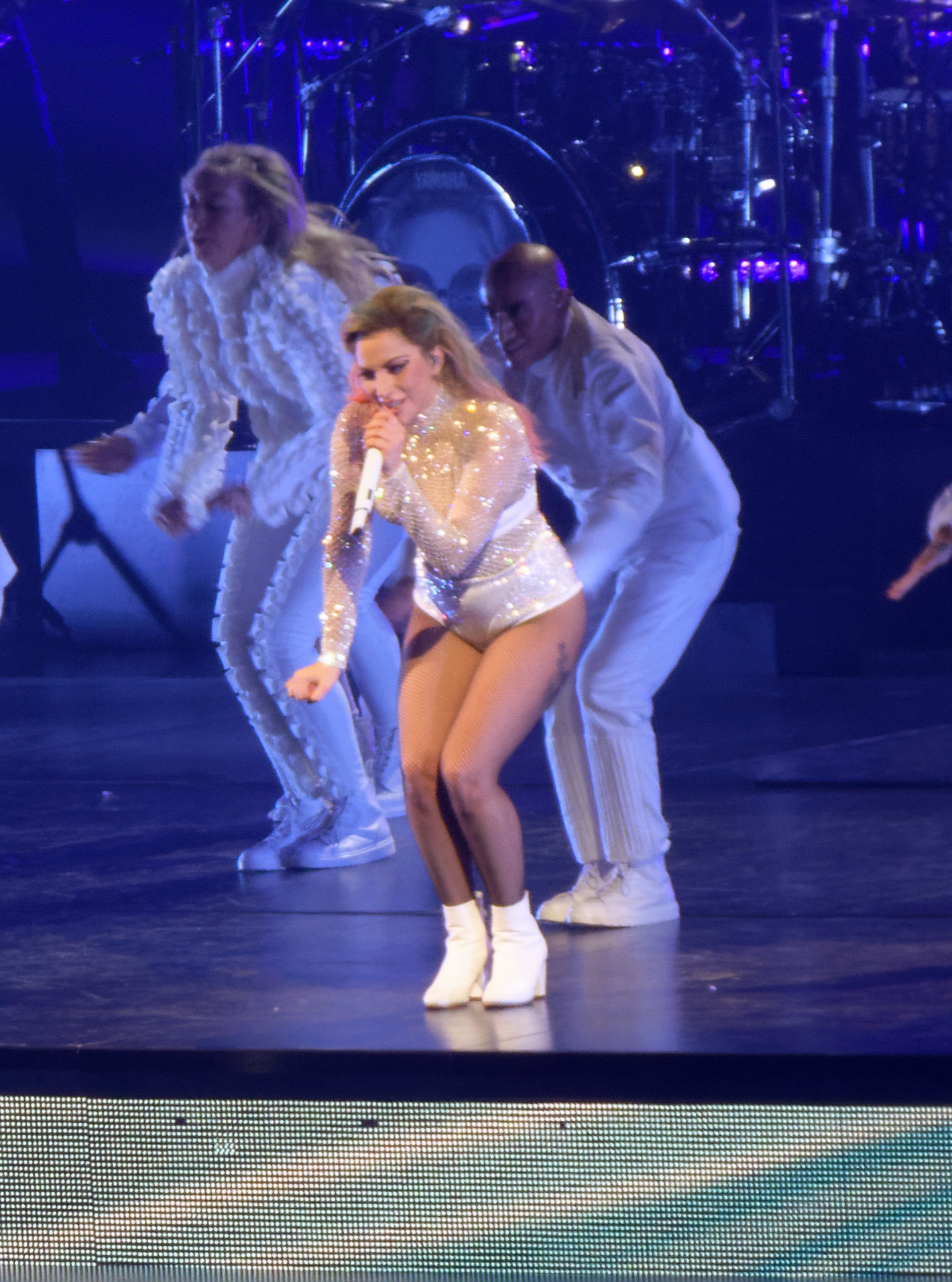 Lady Gaga performing "The Cure" at Joanne World Tour in Tacoma